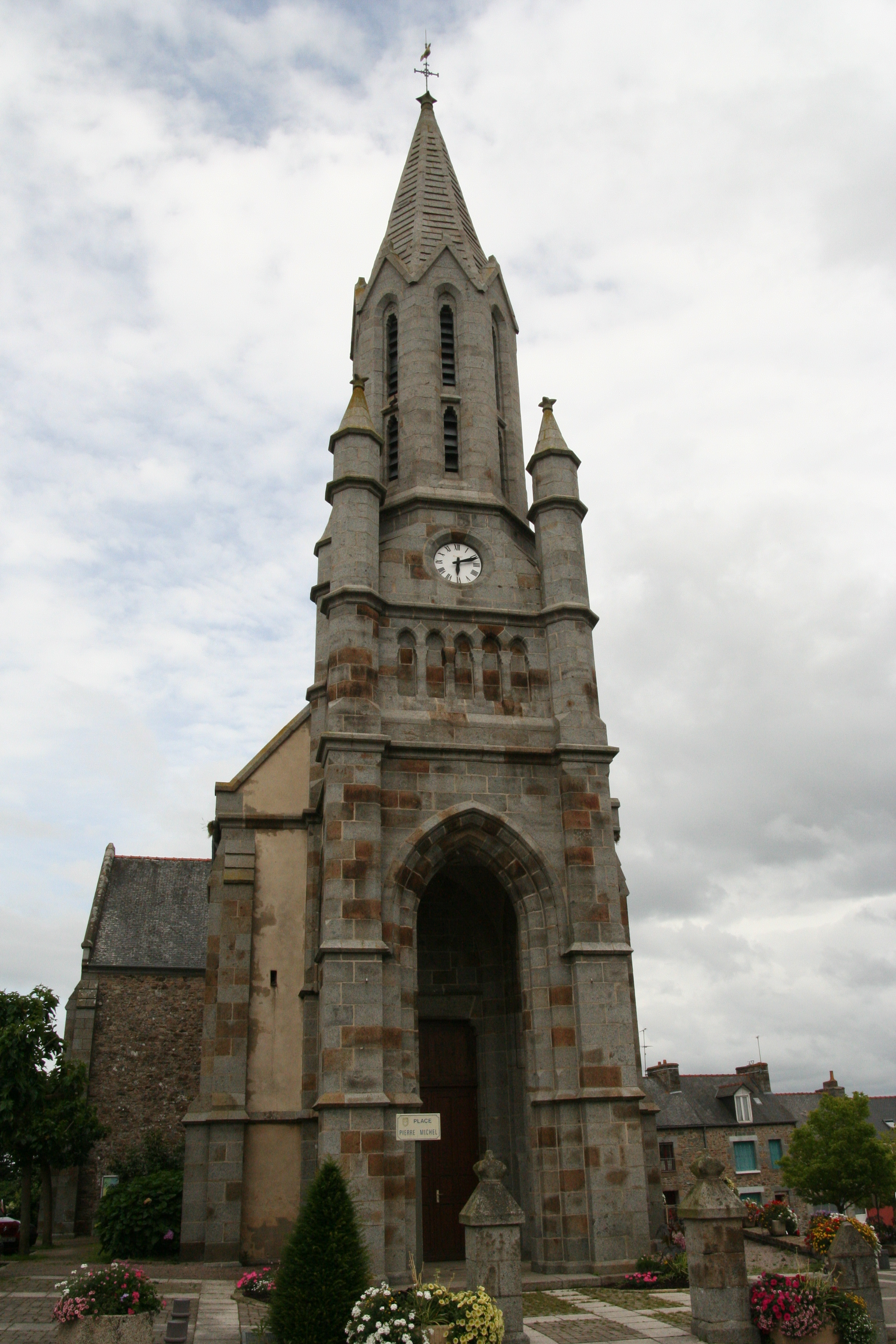 L'église de Trémuson.